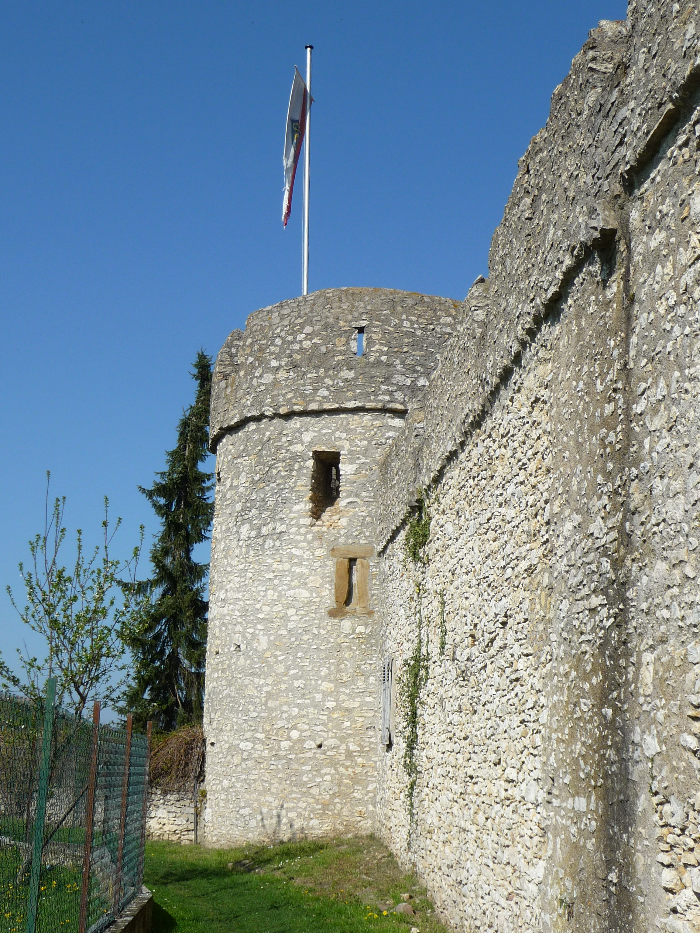 Die Fleckenmauer umschließt den Ortsteil Dalsheim. Sie wurde vermutlich zwischen 1470 und 1490 erbaut und ist heute noch fast vollständig erhalten. Ihre Länge beträgt ziemlich genau ein Kilometer.